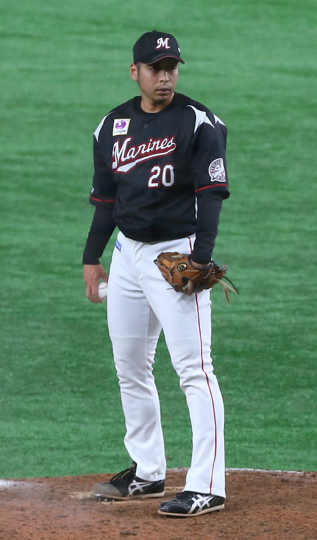 千葉ロッテマリーンズの東條大樹選手。2019年8月14日に東京ドームで撮影。